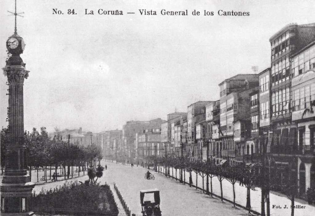 Vista xeral dos Cantóns na Coruña. Fotografía de José Sellier (1850- 1922).